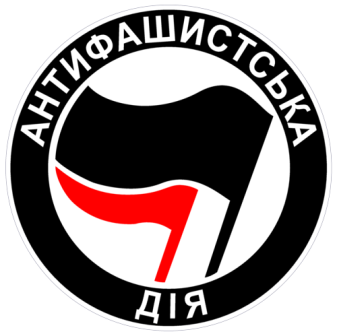 Logo of the «Antifascist Action of Ukraine». Логотип организации «Антифашистское действие Украины» (АФД) – федерации либертарных антифашистов, состоящей из локальных автономных групп.